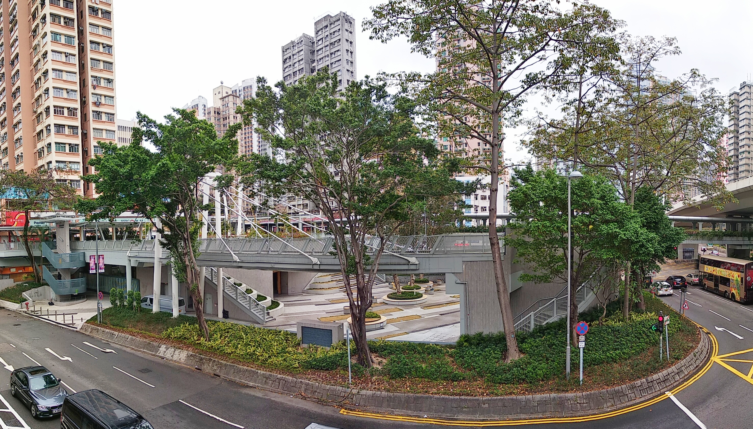 中文（香港）: 2019年除夕的西樓角花園。